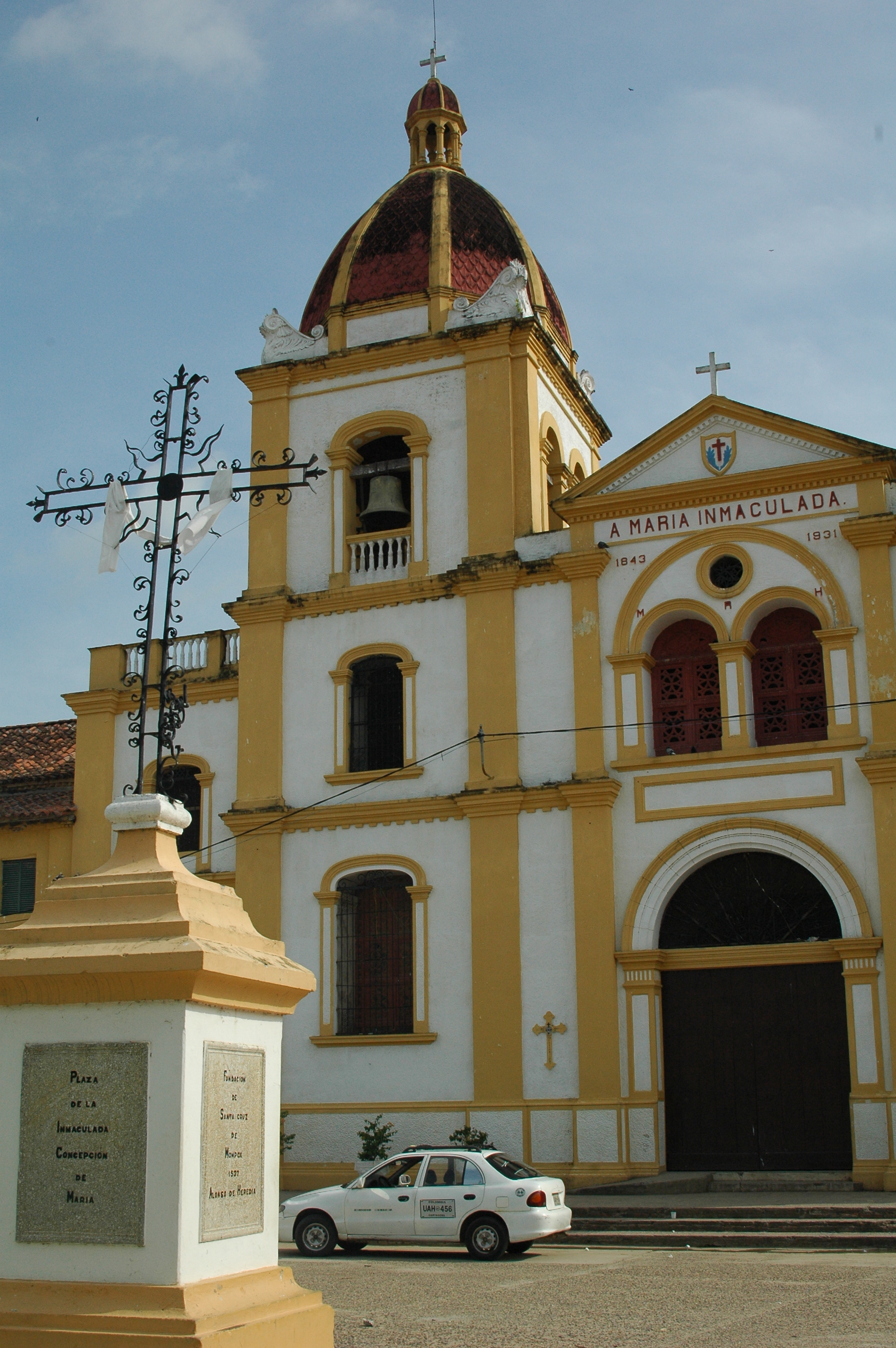 Santa Cruz de Mompox Piazza dell'Immacolata concezione